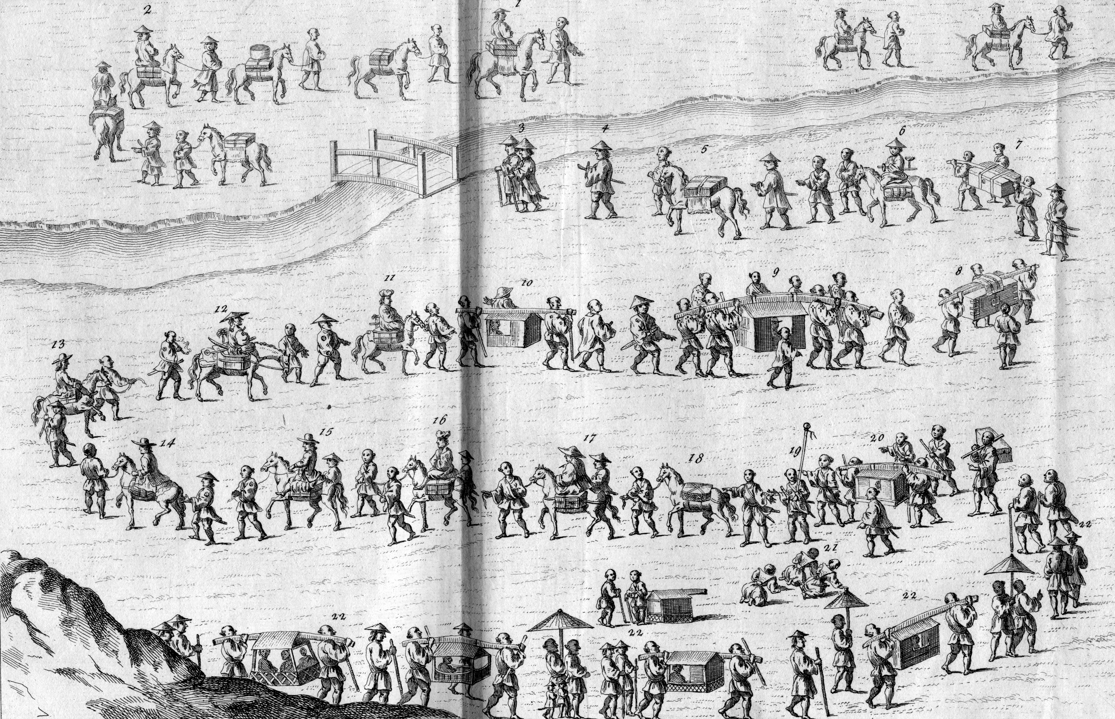 Reisezug des Leiters der niederl. Handelsstation Dejima zum Hofe des Shogun in Edo (heute Tokio) im Jahre 1691/92.